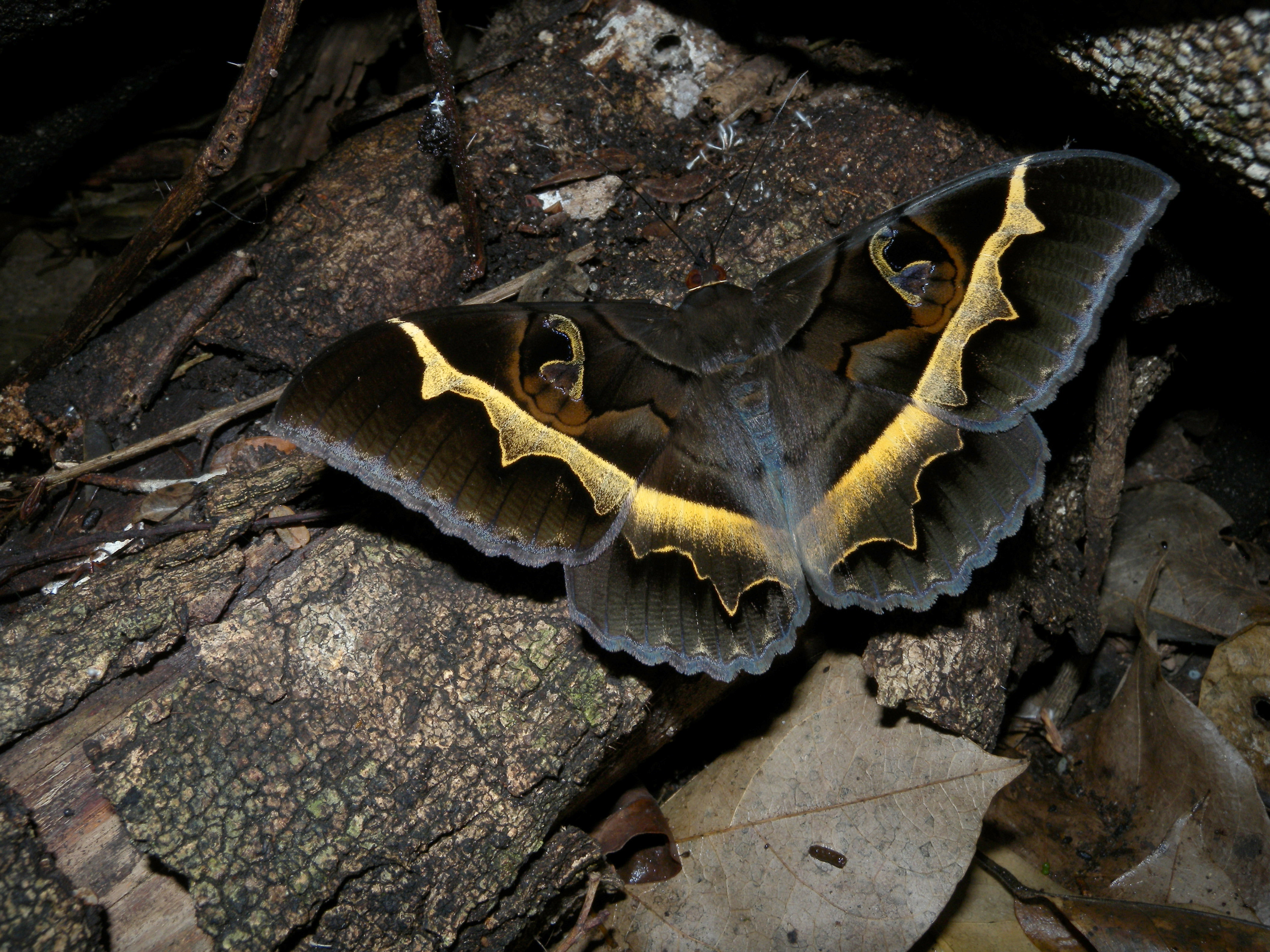 Cyligramma disturbans, Ankarafantsika National Park, Madagascar.